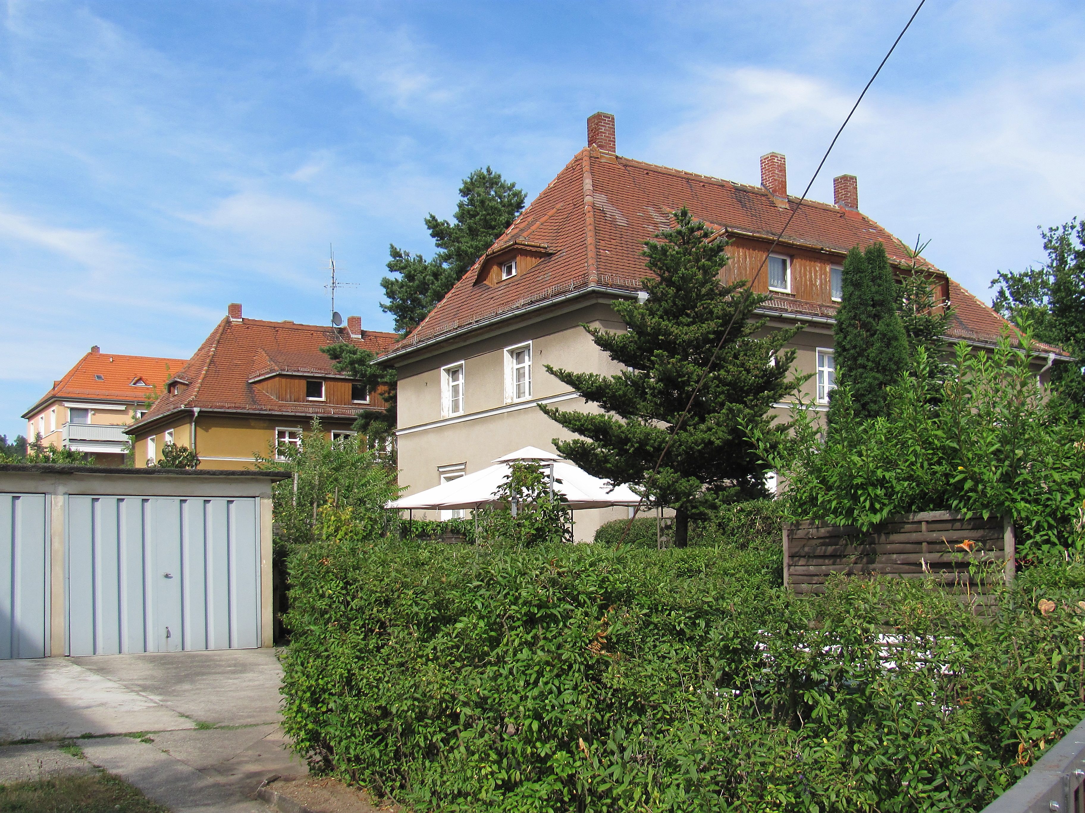 Radebeul-Niederlößnitz, Siedlung der Baugenossenschaft Kötzschenbroda, Siedlungshäuser Heinrich-Zille-Straße 30, 32, 34